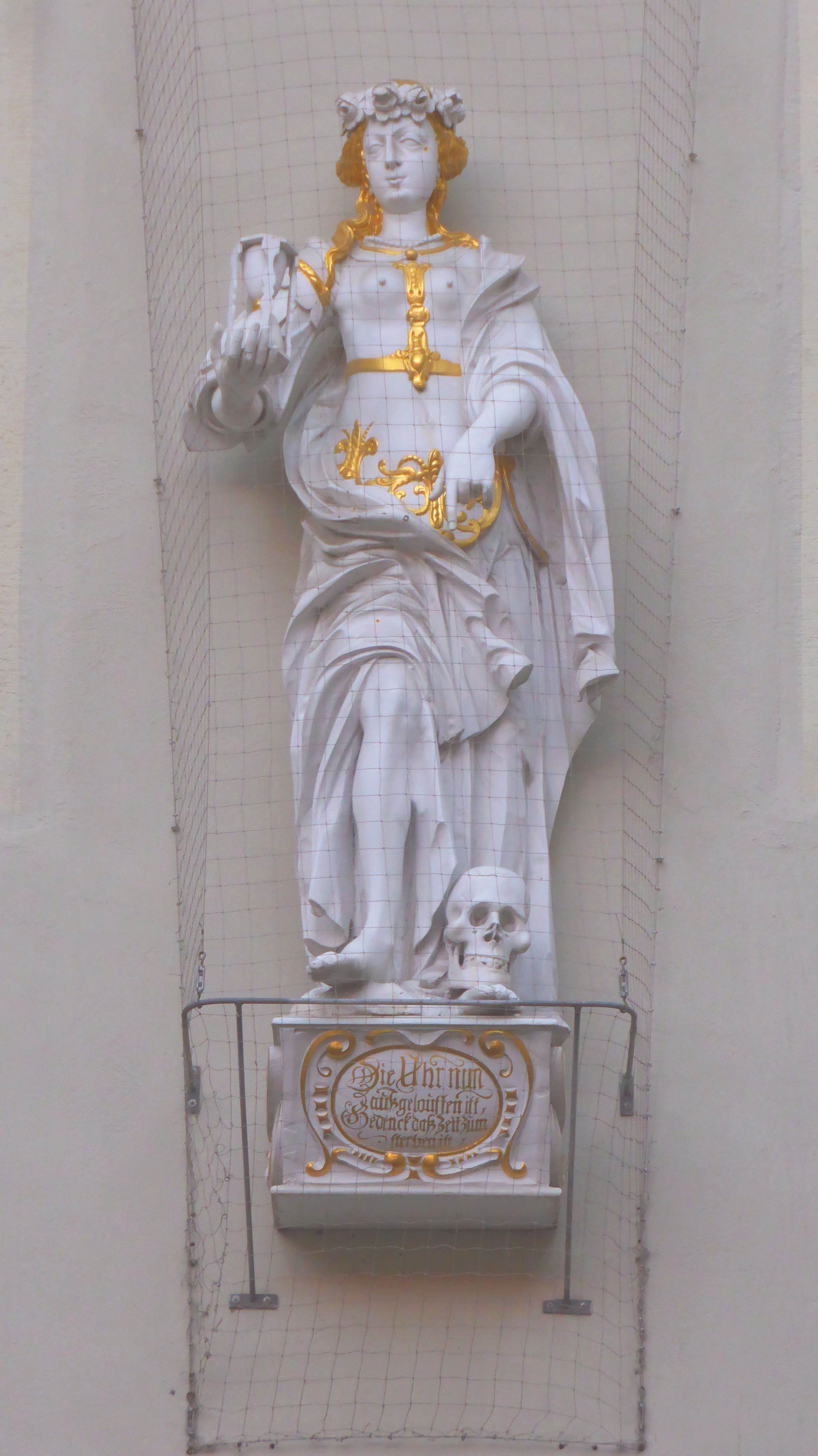 Frauenfigur unterhalb des Uhrenerkers im Thon-Dittmer-Palais